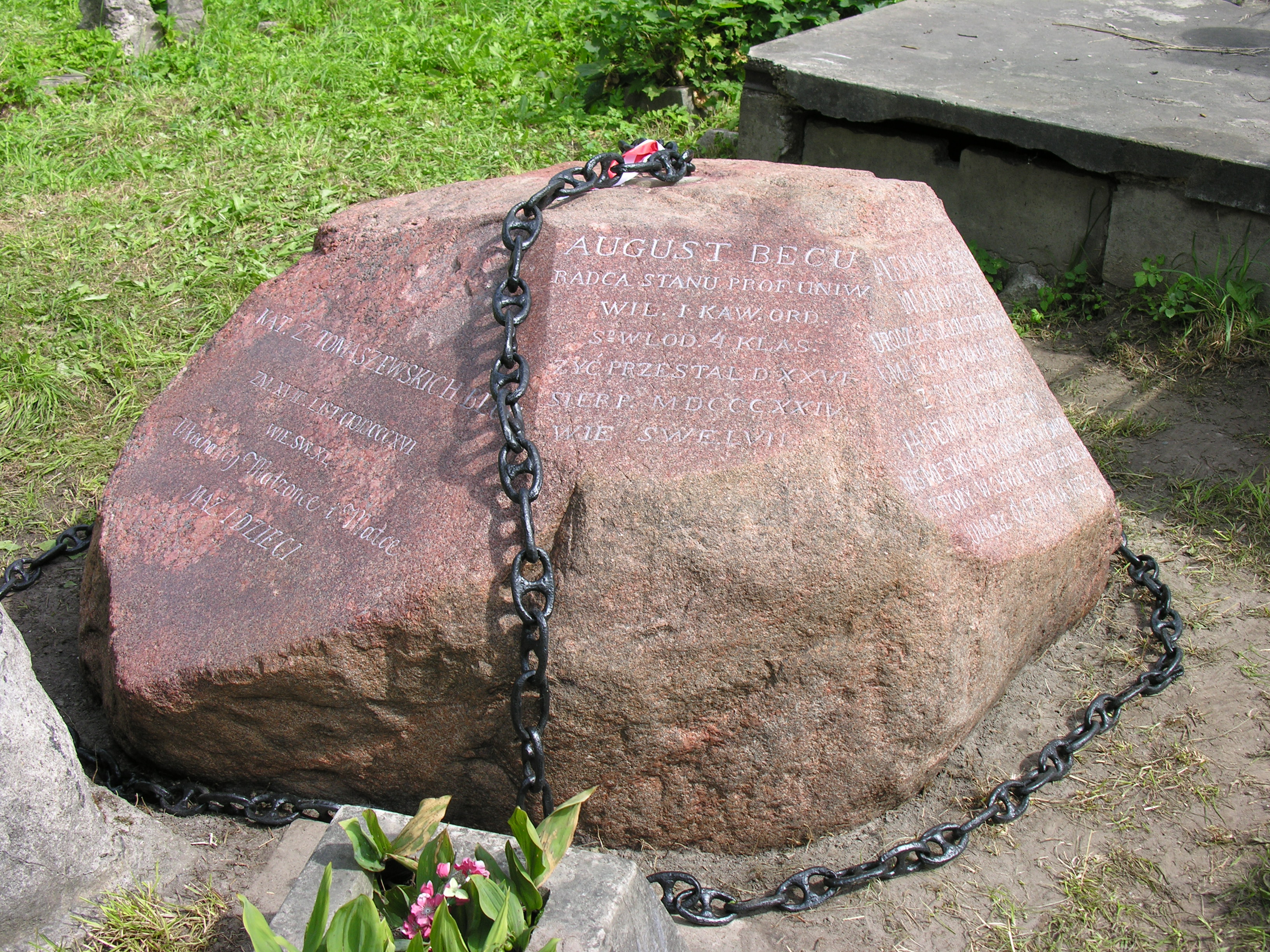 Grób Augusta Becu na Cmentarzu na Rossie w Wilnie.